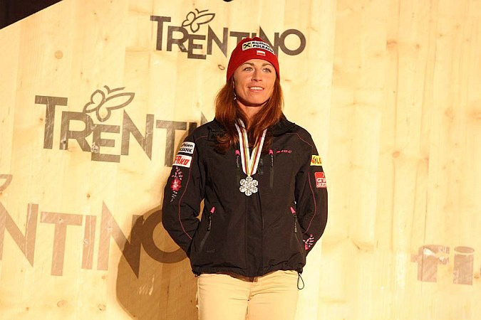 Dekoracja medalowa biegu indywidualnego kobiet na 30 km techniką klasyczną